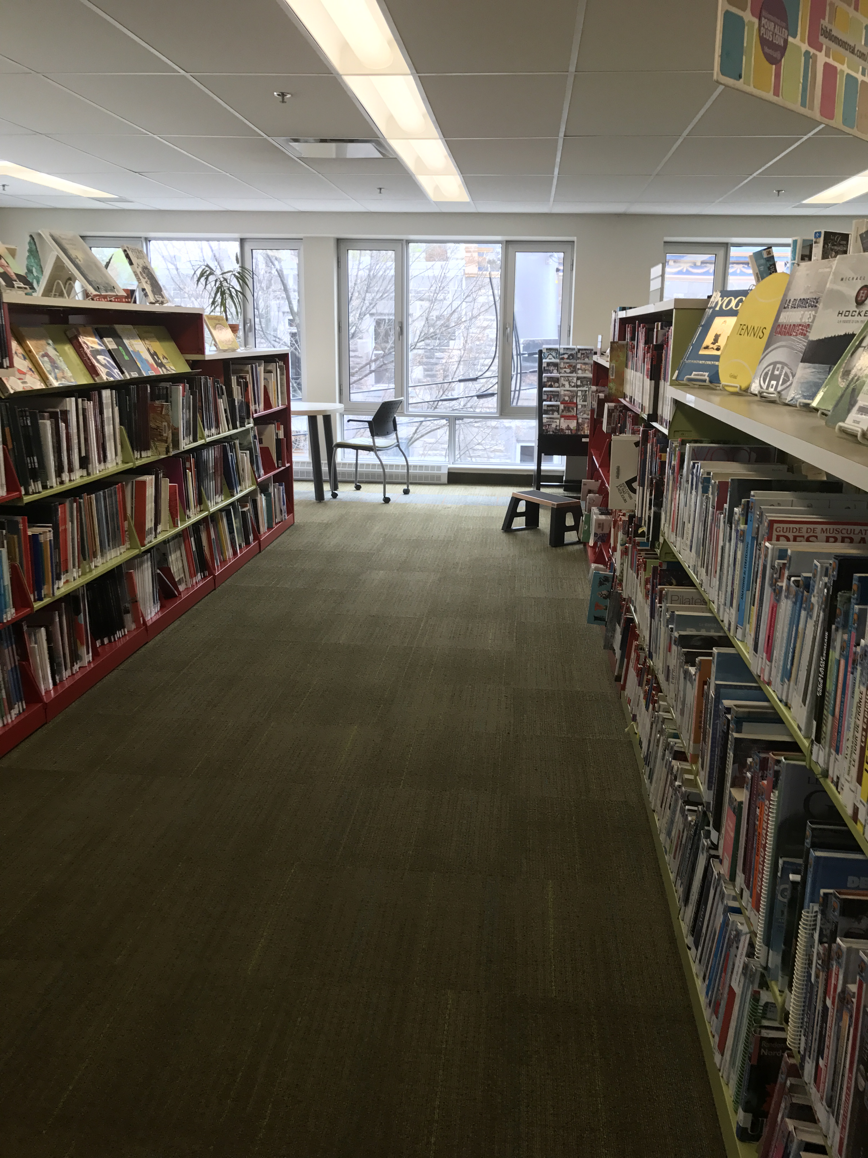 Bibliothèque Père-Ambroise intérieur, cartopartie Open Street Map Montréal